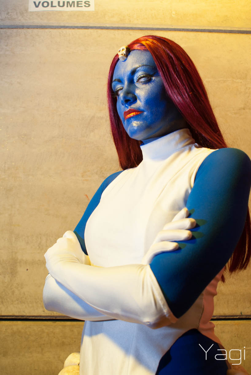 Cosplay da personagem Mística na Comic Con Experience de 2014